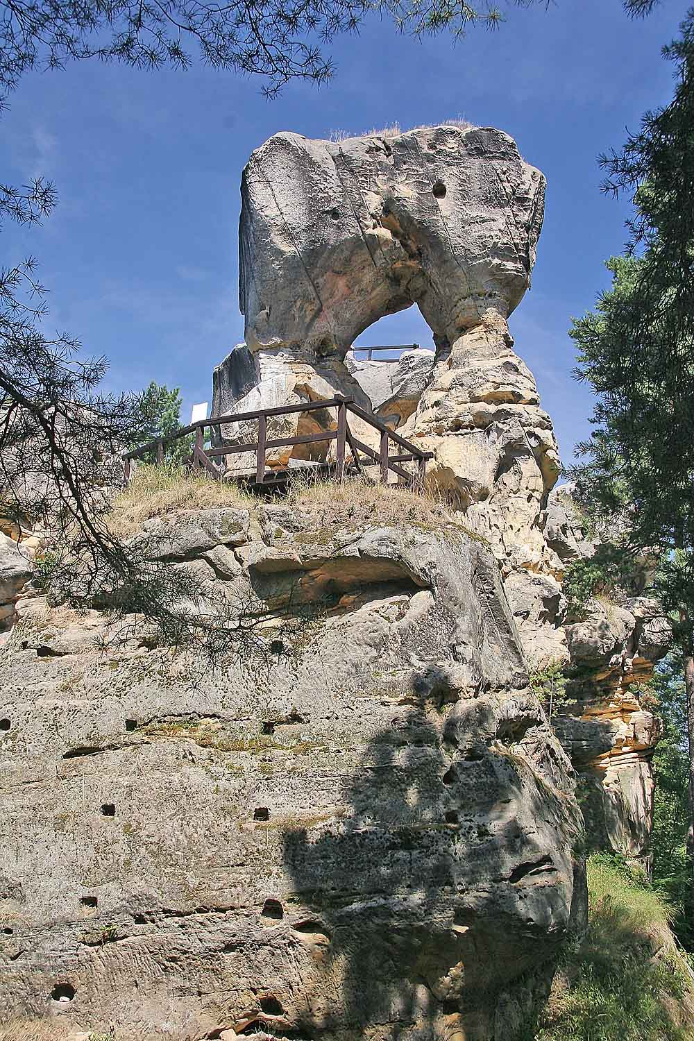 Skalní hrad Rotštejn, Bohemian Paradies, Klokočské skály, Czech Republic